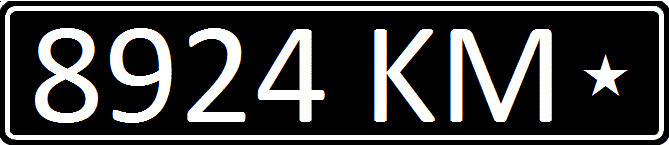 Передний автомобильный знак вооружённых формирований Киргизии